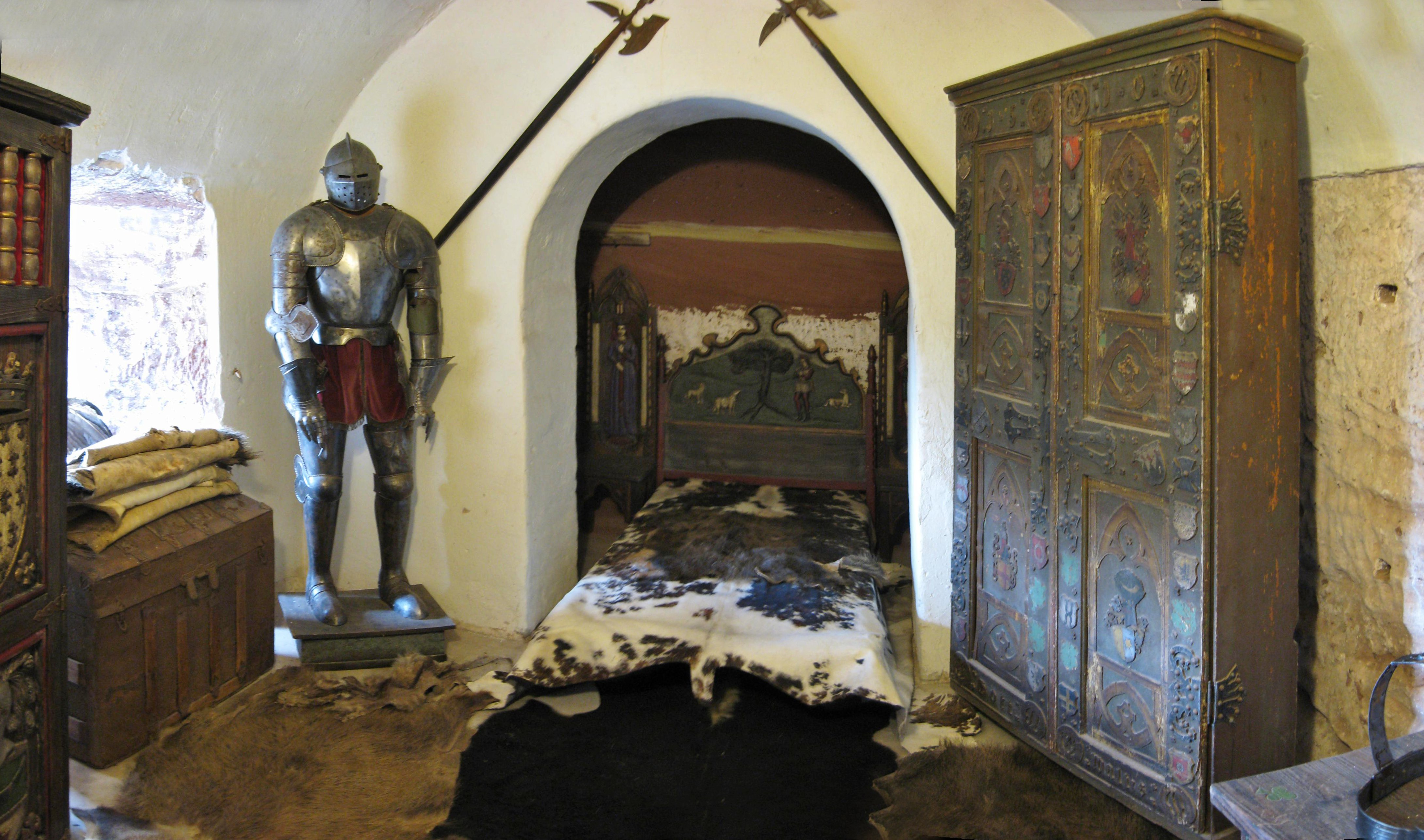 Schlafzimmer auf der Burg Berwartstein